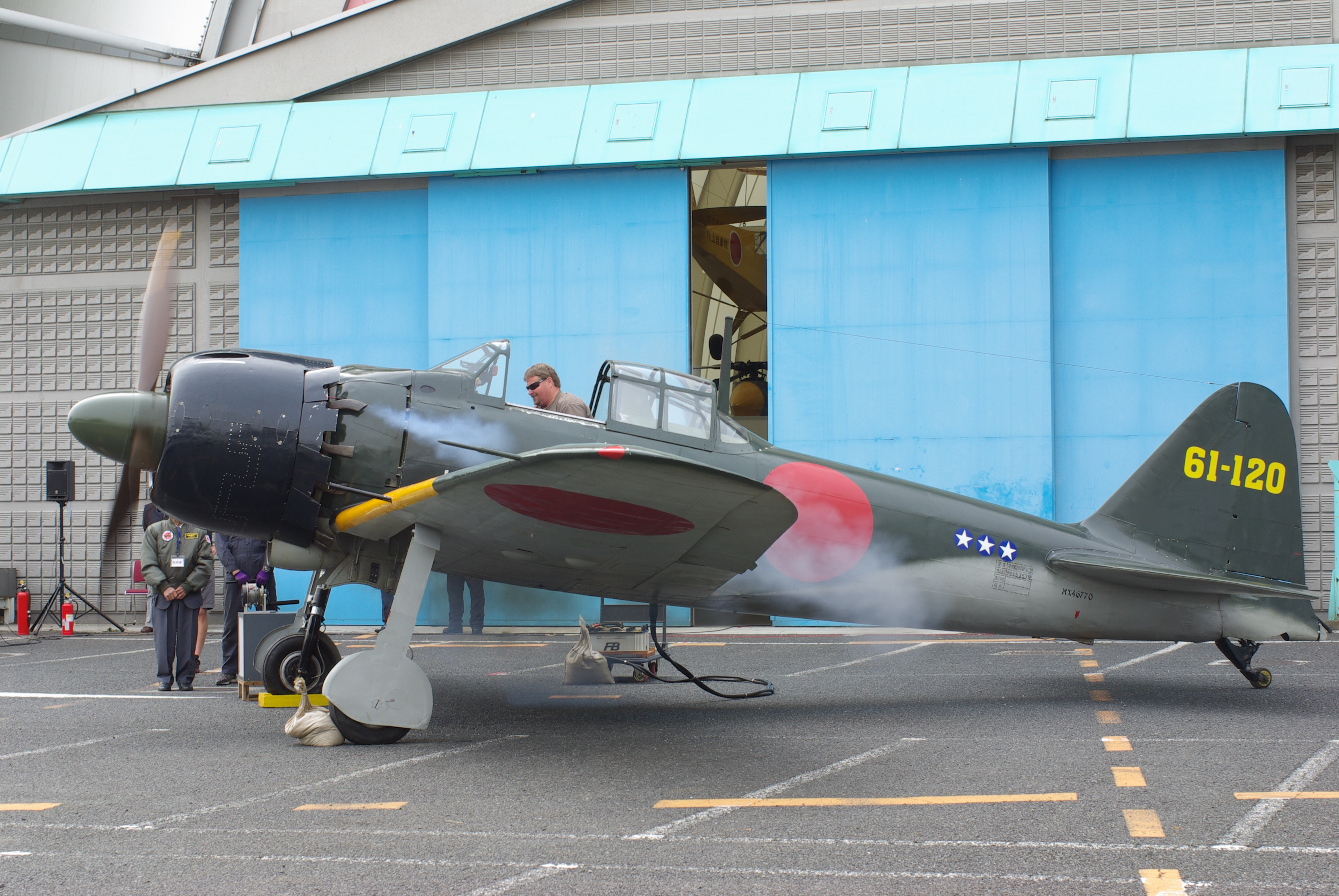 栄エンジン始動直後の零式艦上戦闘機。埼玉県所沢市航空発祥記念館。